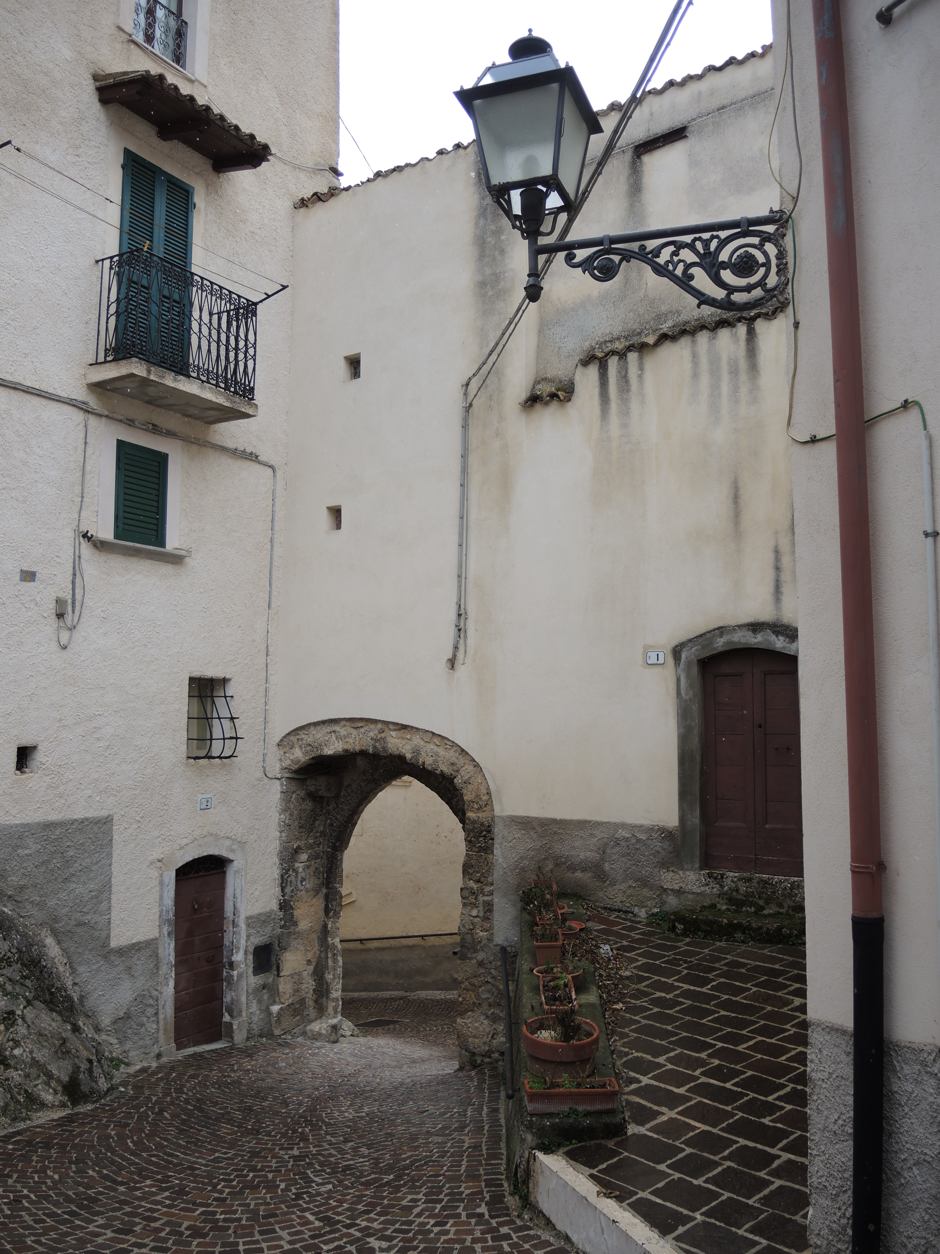 Castrovalva